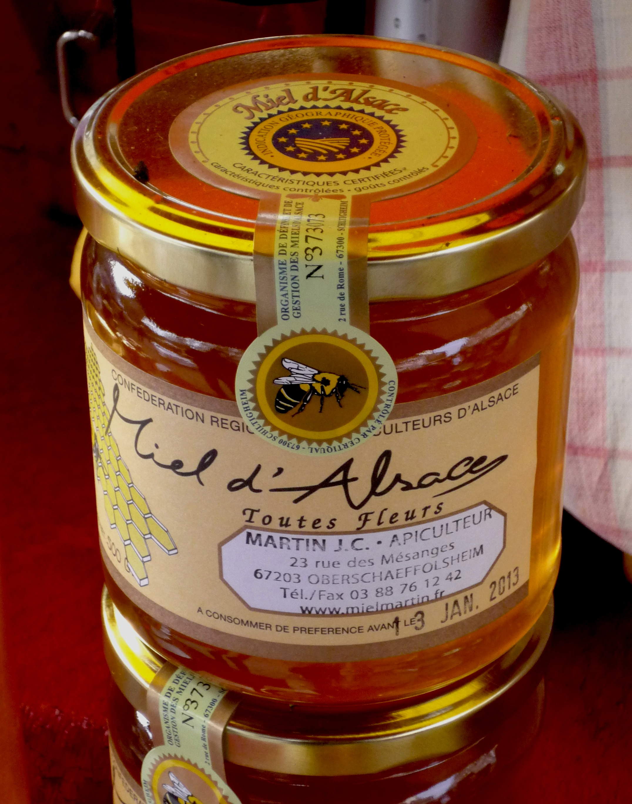 Miel d'Alsace label IGP